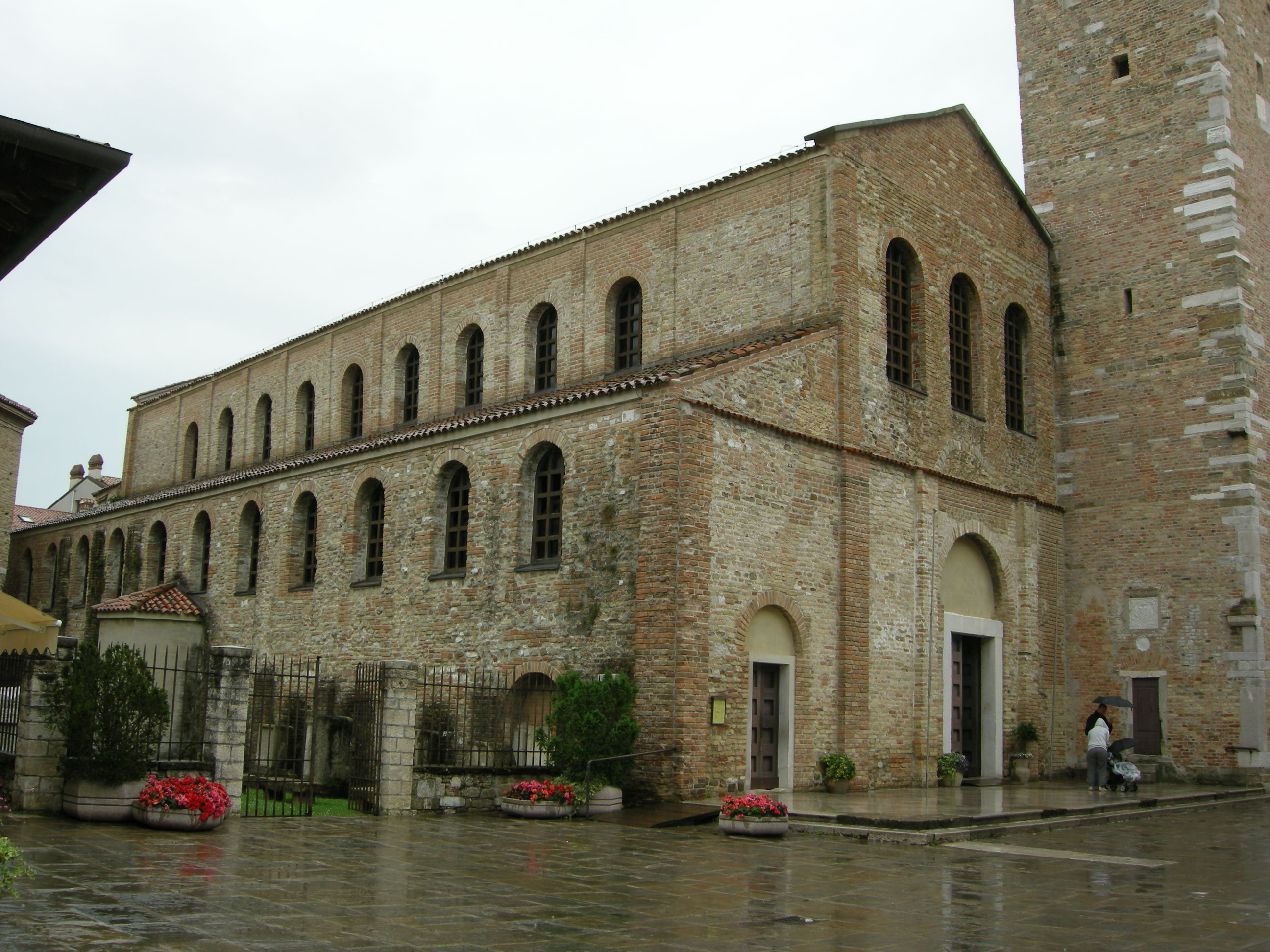 Grado, basilica di sant'eufemia